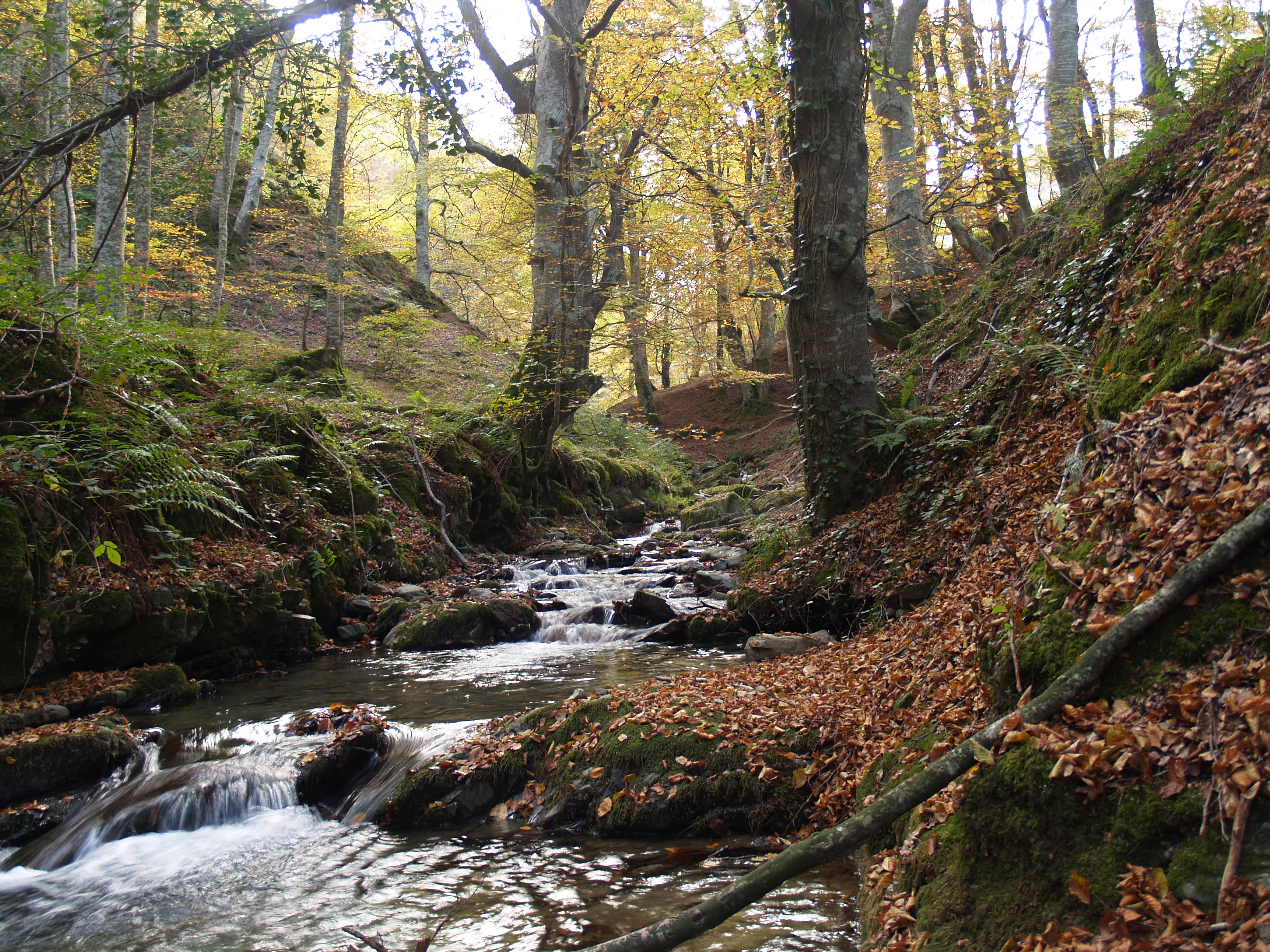 Sierras de Demanda, Urbión, Cebollera y Cameros This is a photography of a Special Area of Conservation in Spain with the ID: ES0000067. Natura2000 entry, EEA entry